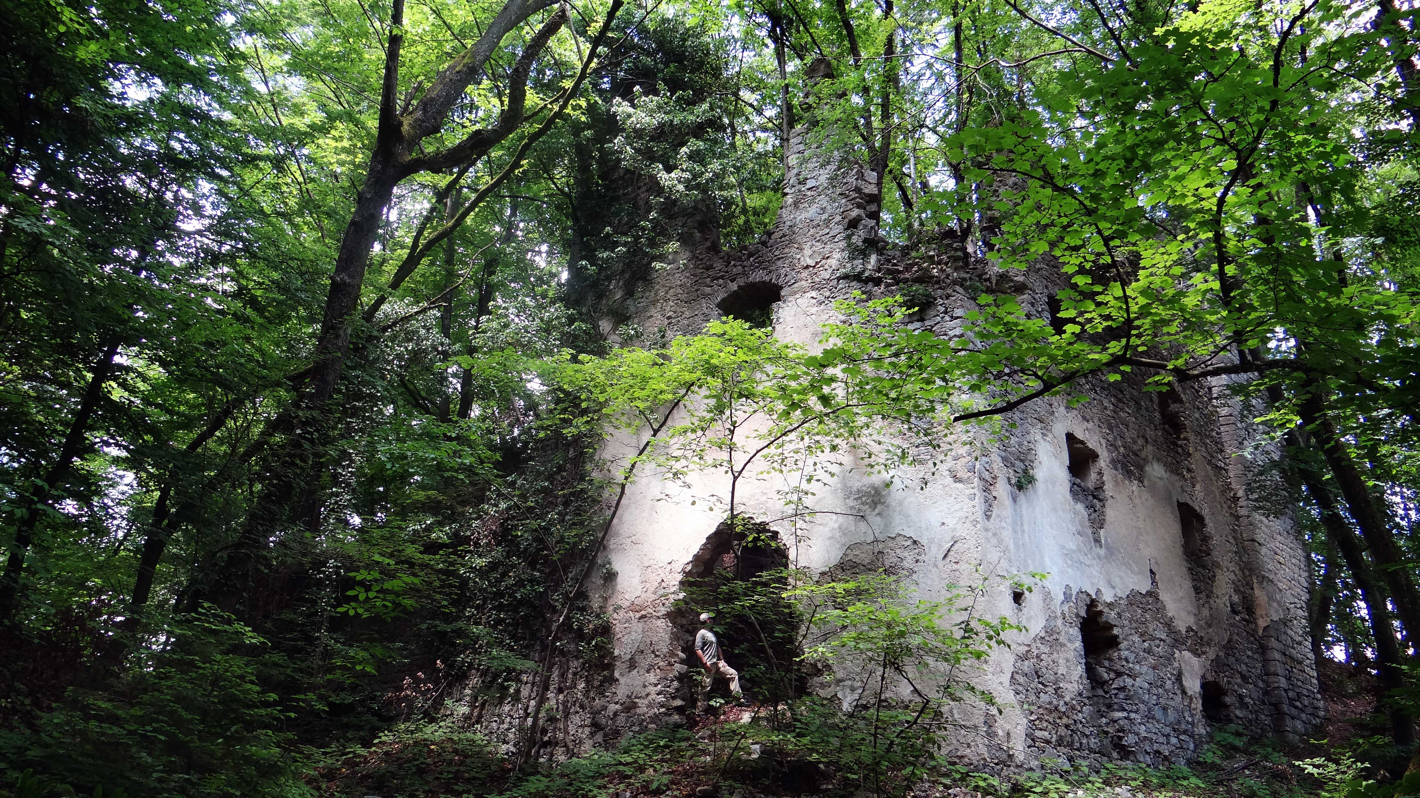 Ruševina gradu Čretež I. (Reitenburg), Dolenje Laknice